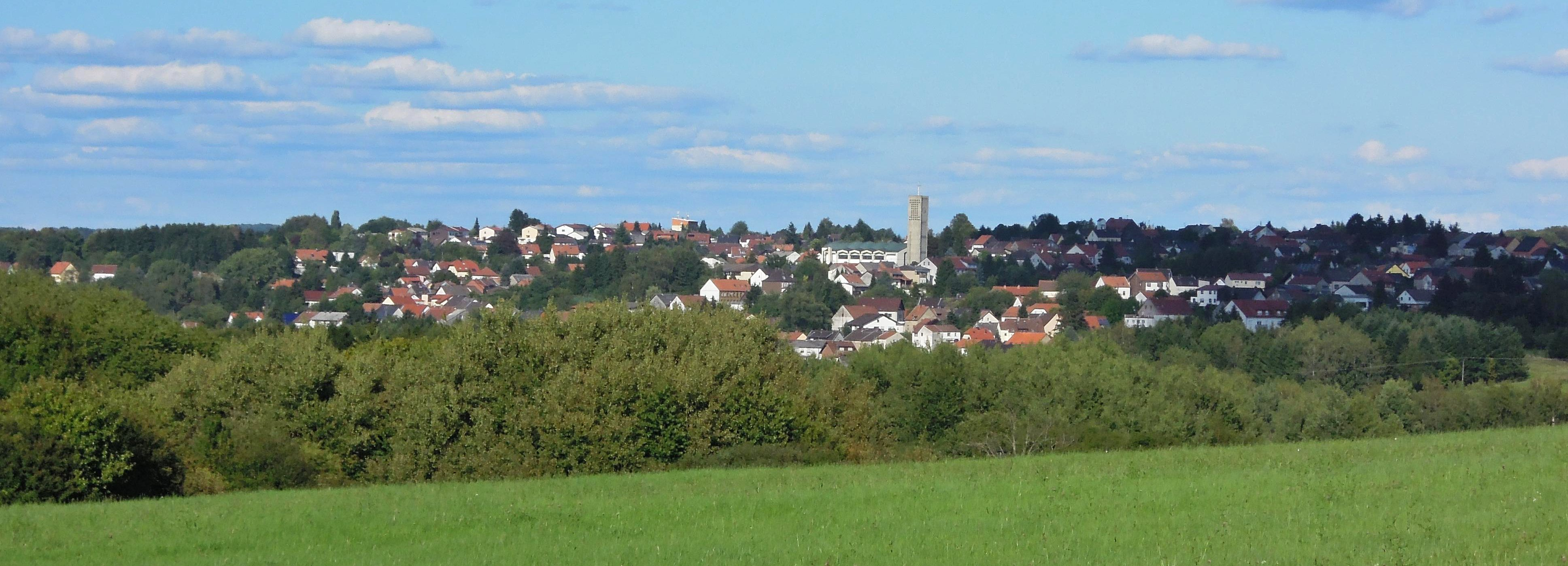 Blick auf Merchweiler vom Göttelborner Dolen